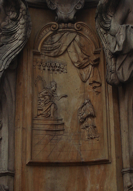 Johannes von Nepomuk vor König Wenzel, Relief.